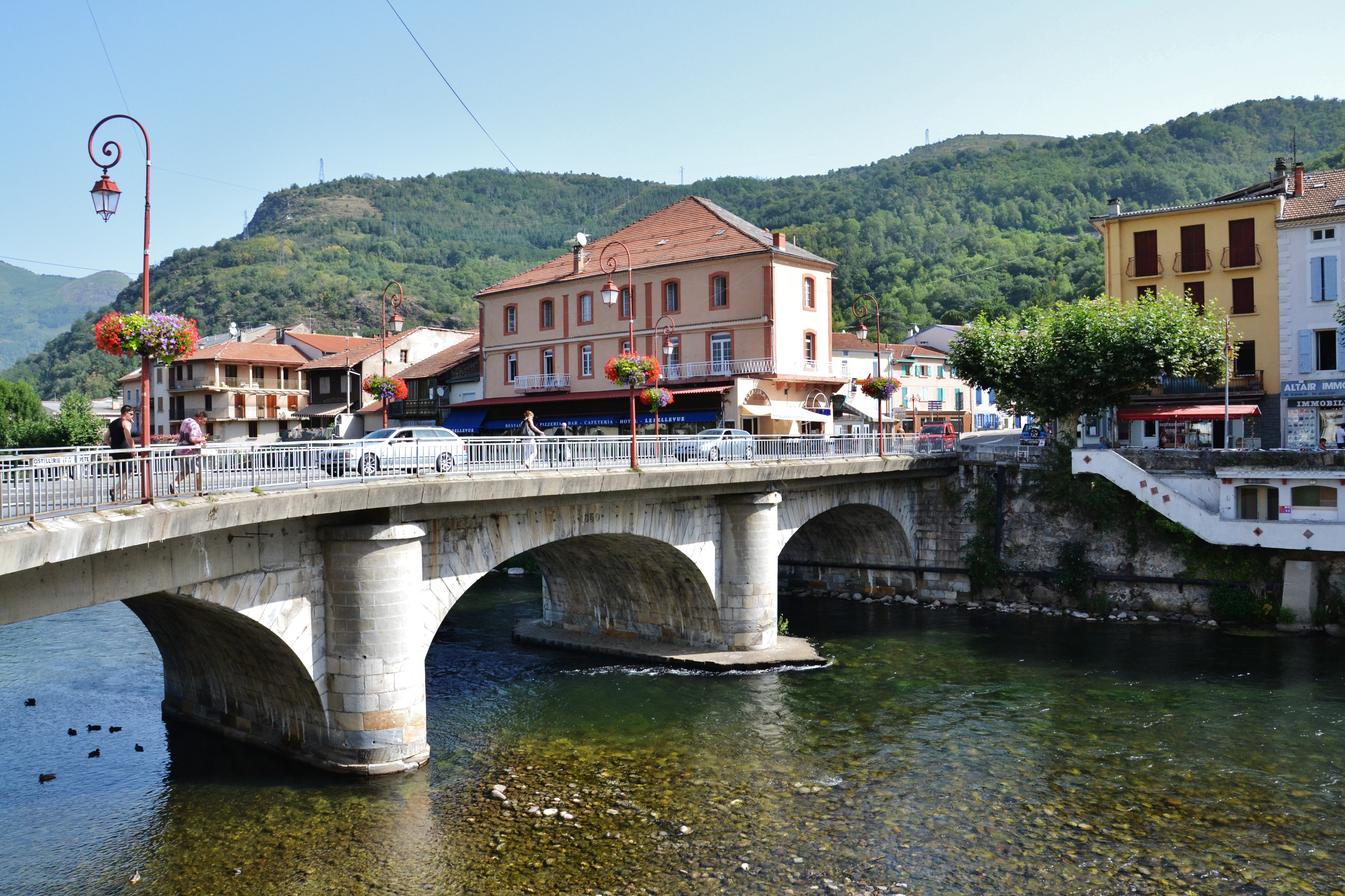 Pont sur l'Ariège à Tarascon-sur-Ariège (Ariège, Midi-Pyrénées, France).